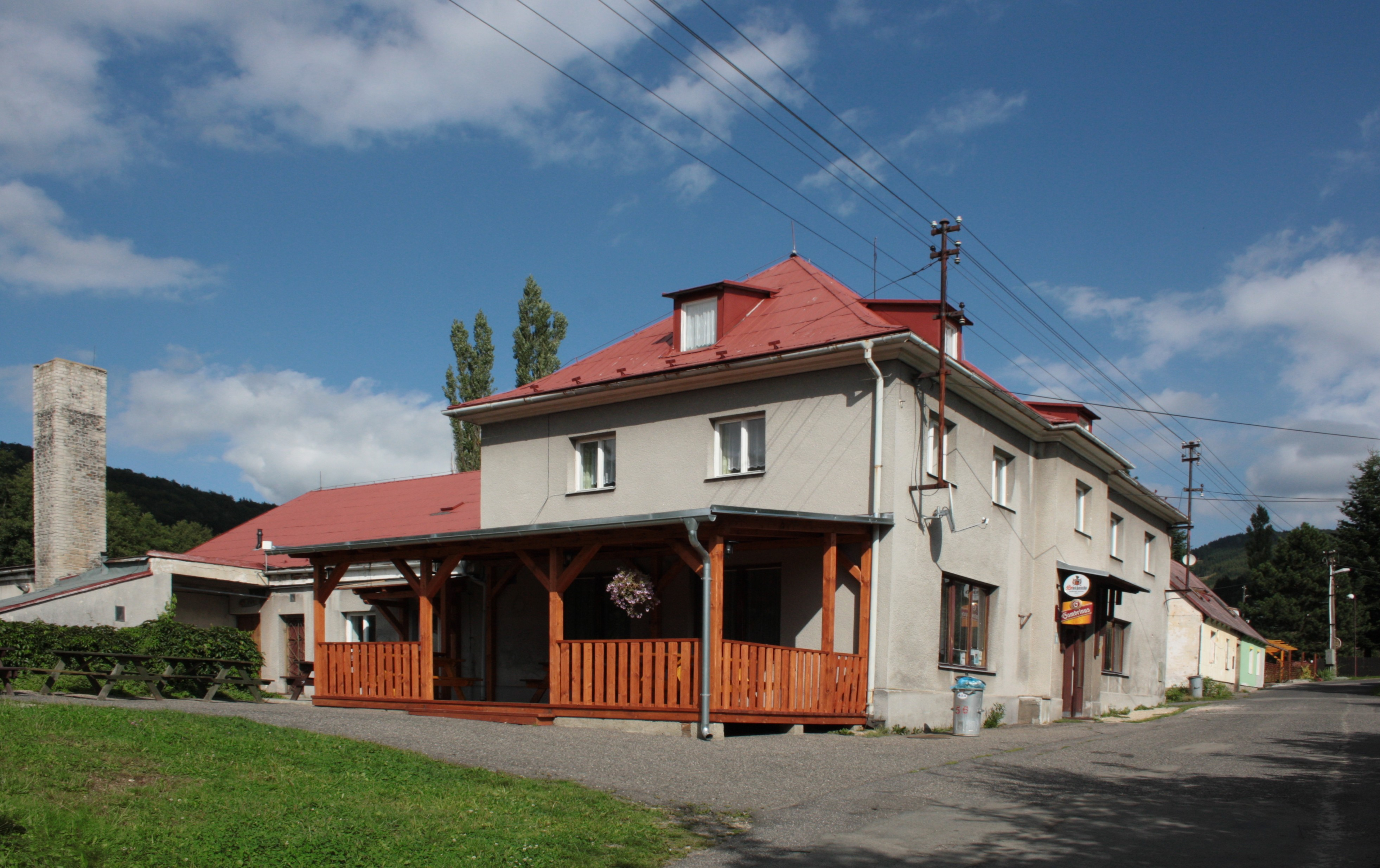 Restaurace Vzlet v Lázních Libverdě čp. 56 (pohled od západu).